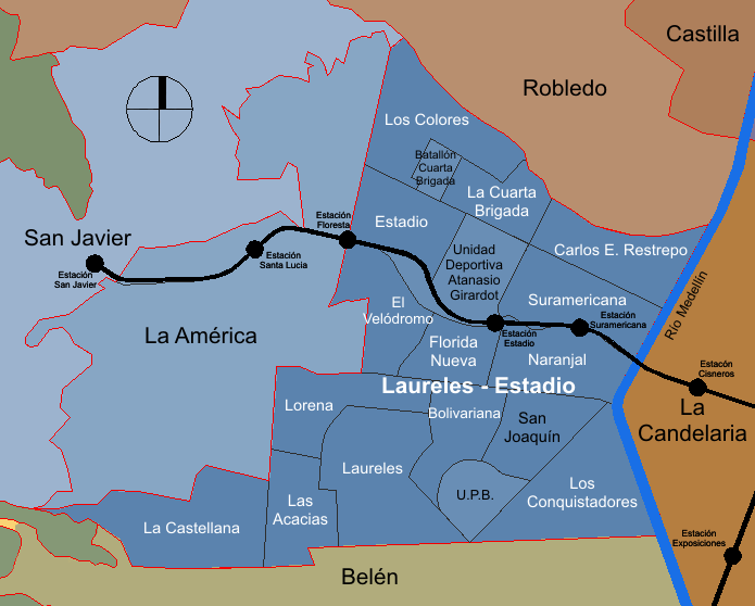 mapa de la división barrial de la comuna Laureles-Estadio. Medellín, Colombia.